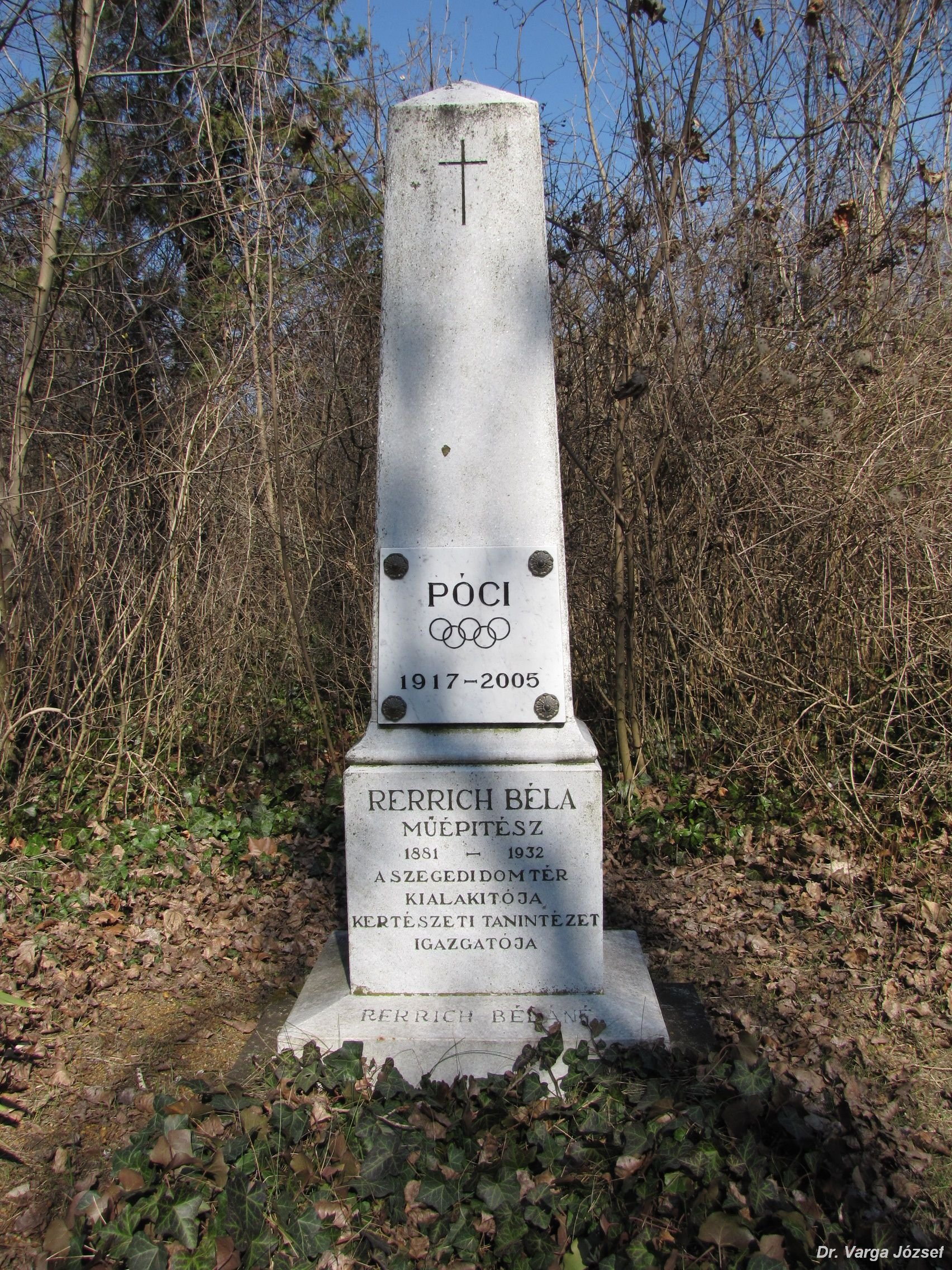 Rerrich Béla (Budapest, 1881. július 25. – Budapest, 1932. február 23.) műépítész, kertépítőművész és fia, ifjabb Rerrich Béla (Budapest, 1917. november 26. - Stockholm, 2005. június 24.) párbajtőrvívó, edző sírja Budapesten. Kerepesi temető: 46-1-97.